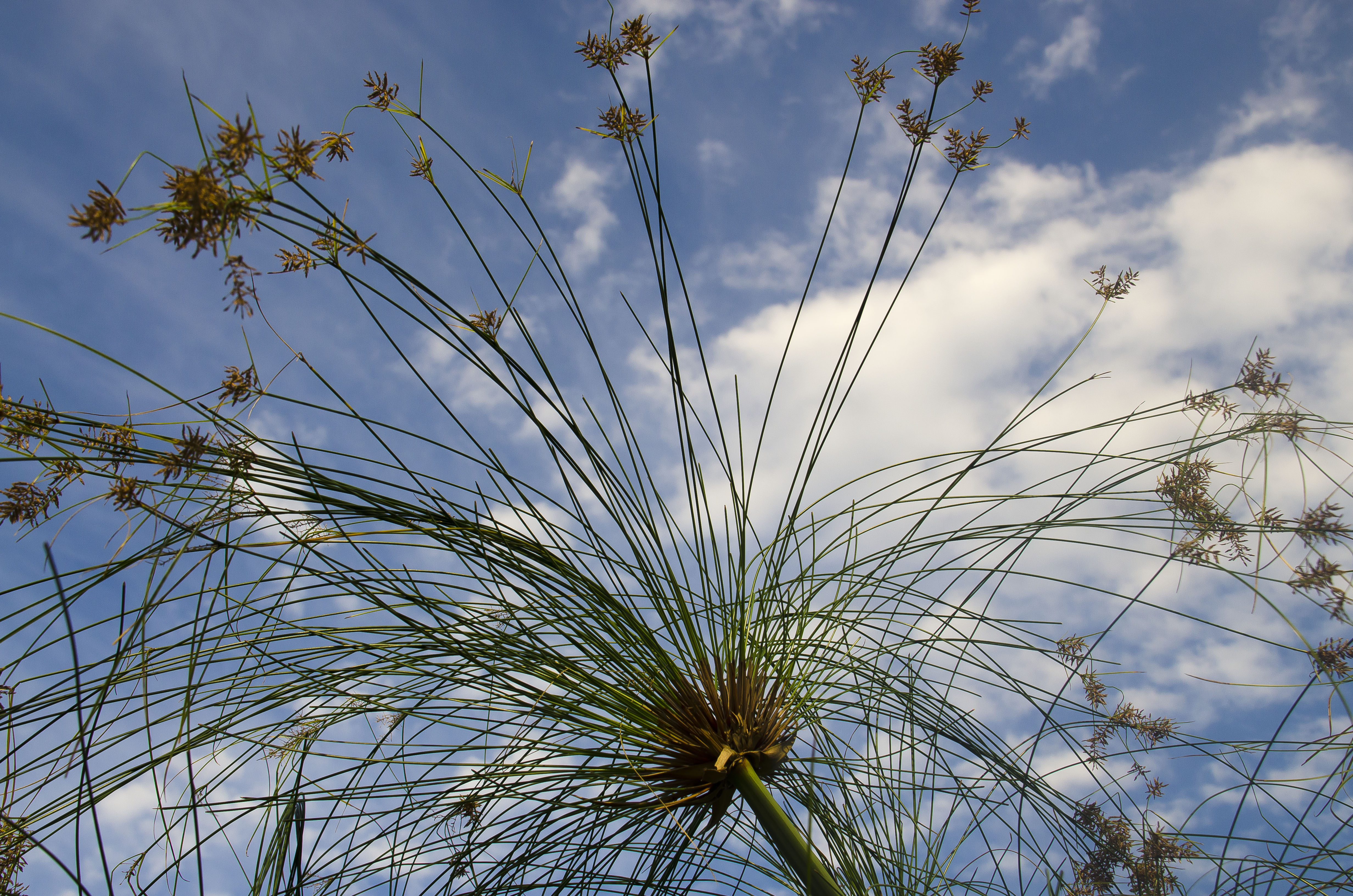 Papyrus Sedge (Cyperus papyrus), Riserva Naturale Orientata Fiume Ciane - Saline di Siracusa, near Siracusa, Sicily